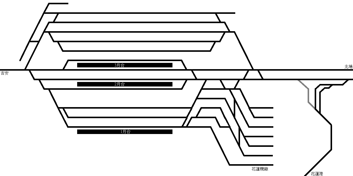 花蓮車站軌道配置圖